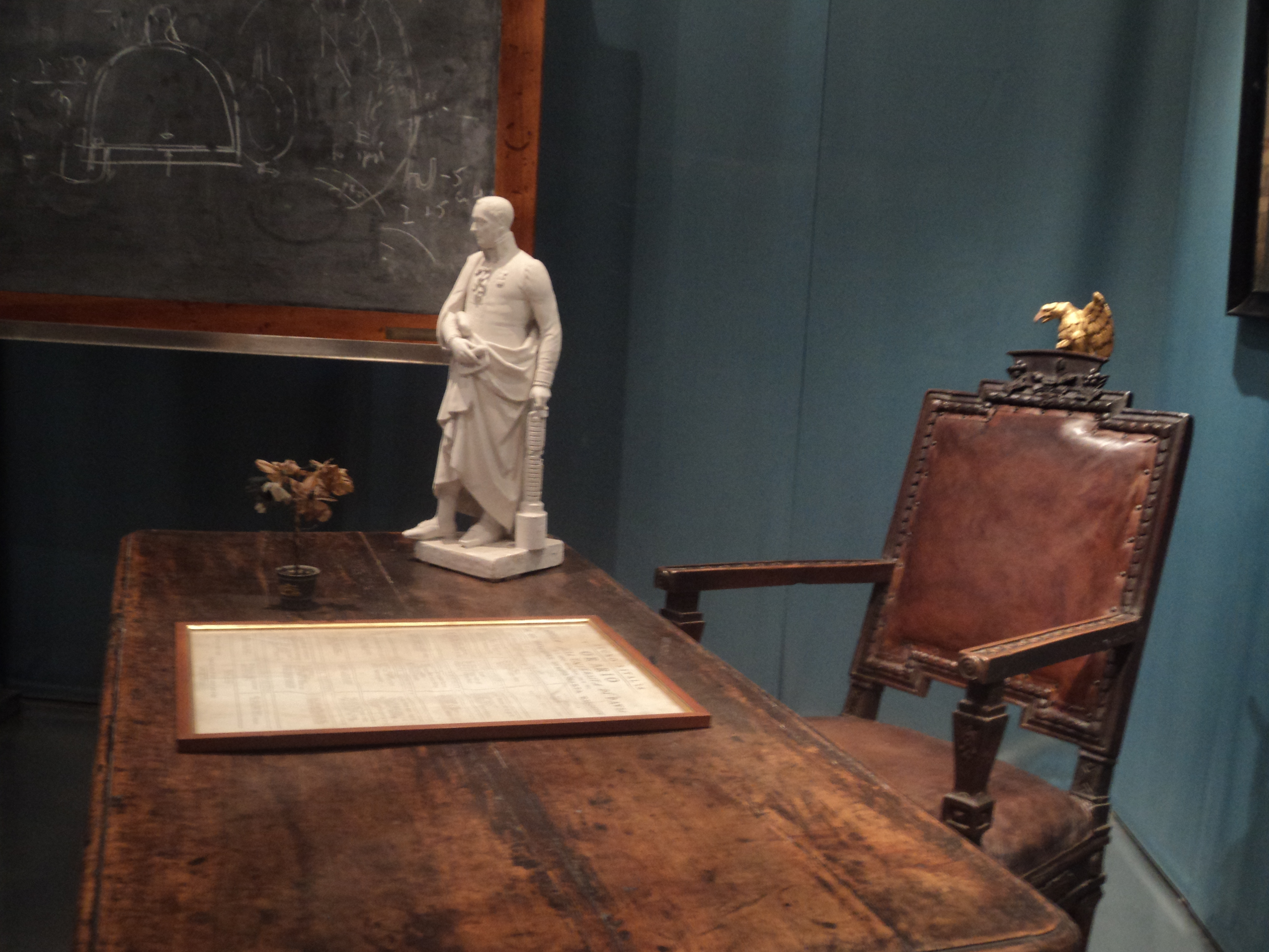 Cattedra e lavagna di Alessandro Volta nel Gabinetto di Fisica dell'Università di Pavia, all'interno del Museo per la Storia dell'Università di Pavia